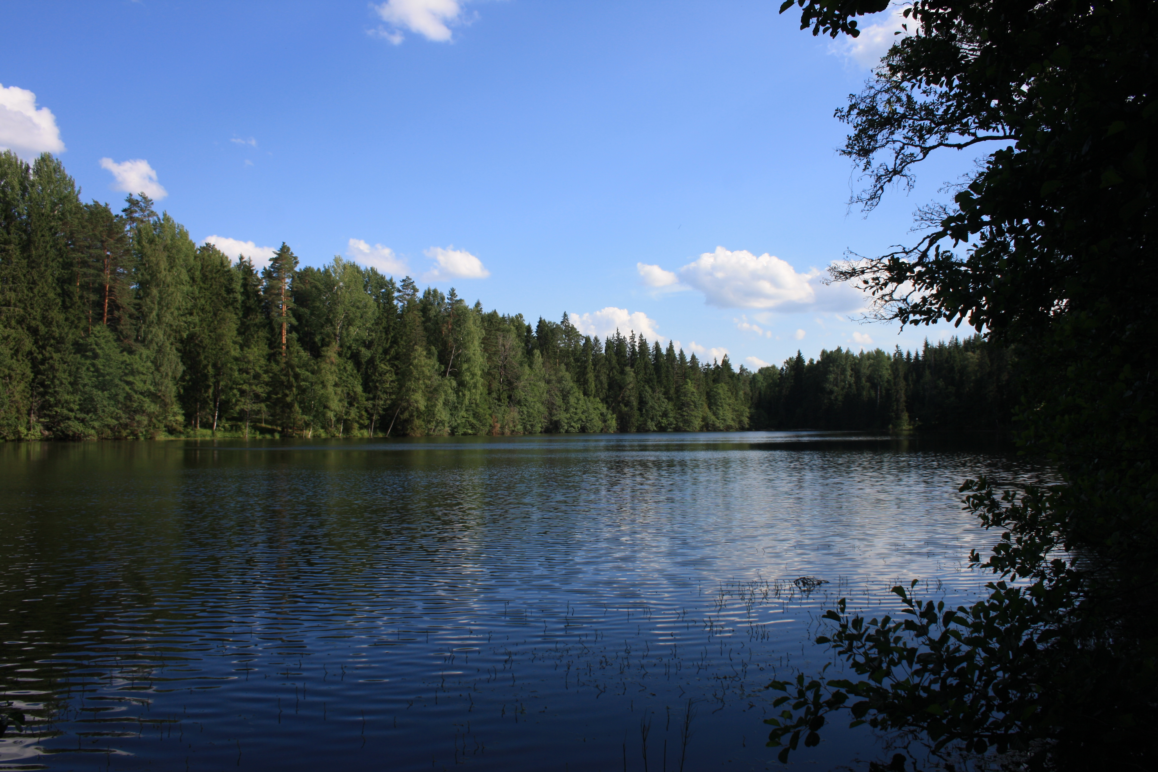 Vaade Väike-Palkna järvele.